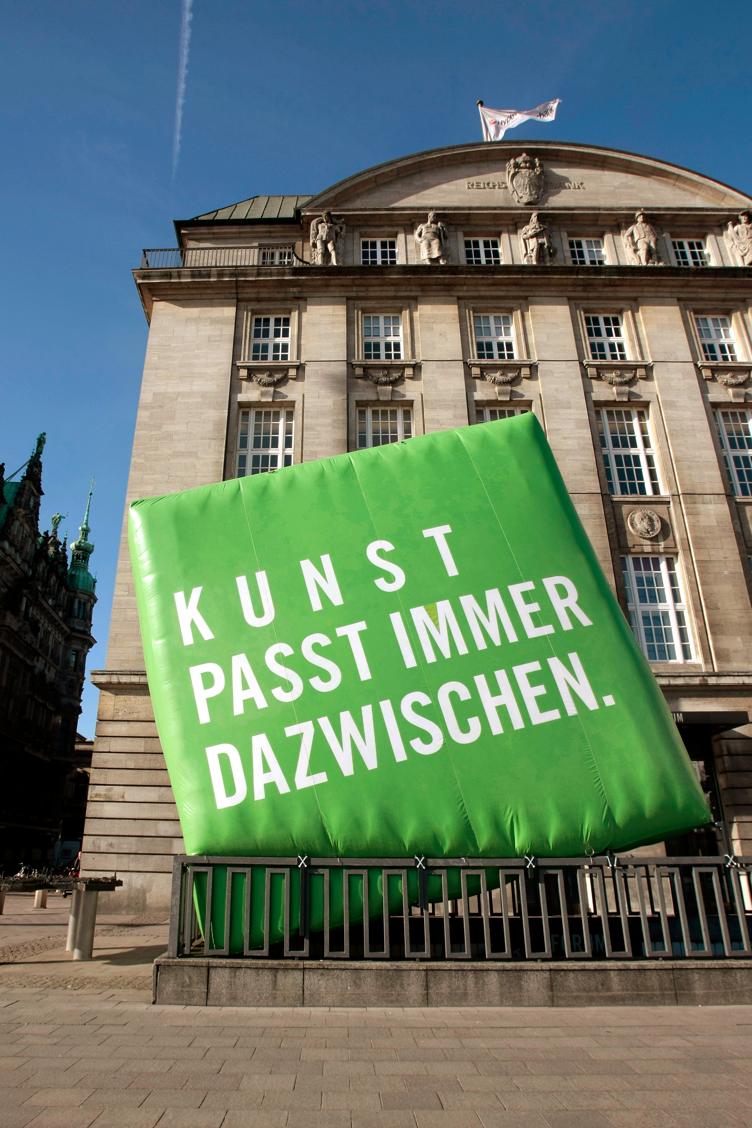 Imagekampagne.This is a photograph of an architectural monument.